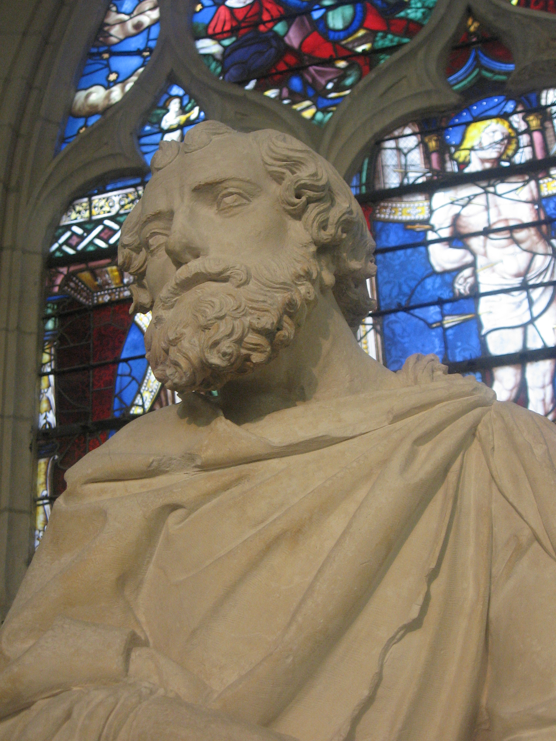 Exposition "Le Beau XVIe siècle". Saint Pierre XVIe siècle. Statue, calcaire avec traces de polychromie. Saint Pouange (Aube) Classé Monument historique le 27.12.1913